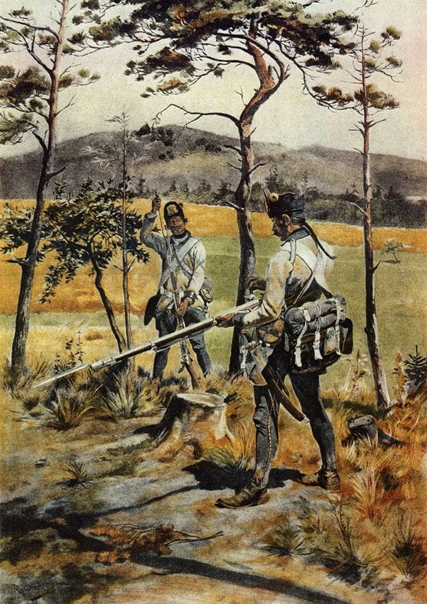 Infanterie hongroise, armée autrichienne, 1770-1798.